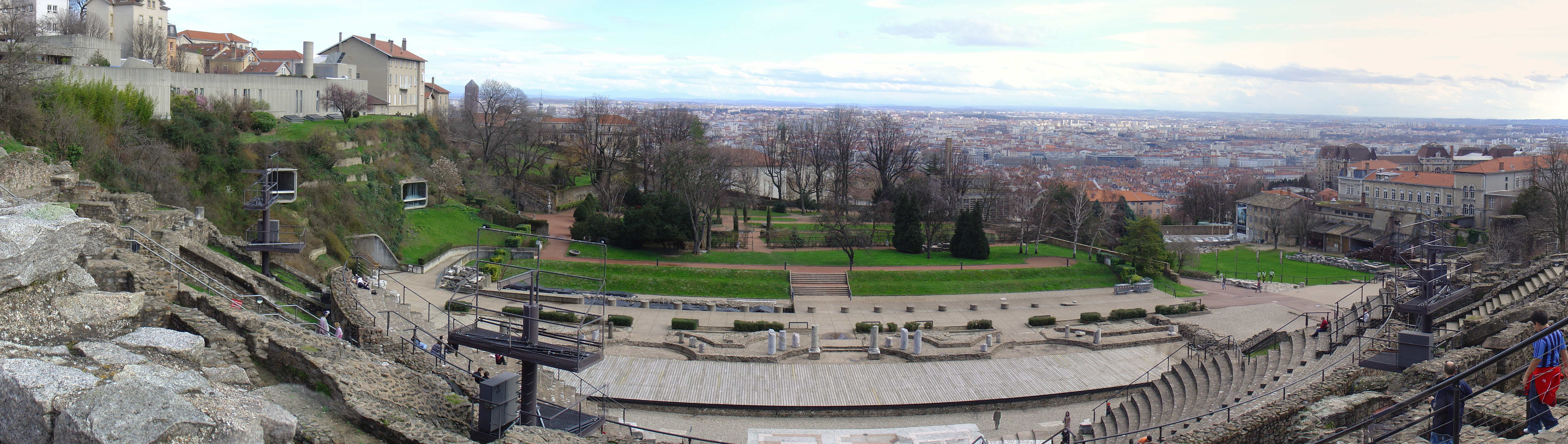 Vue sur Lyon depuis le théatre